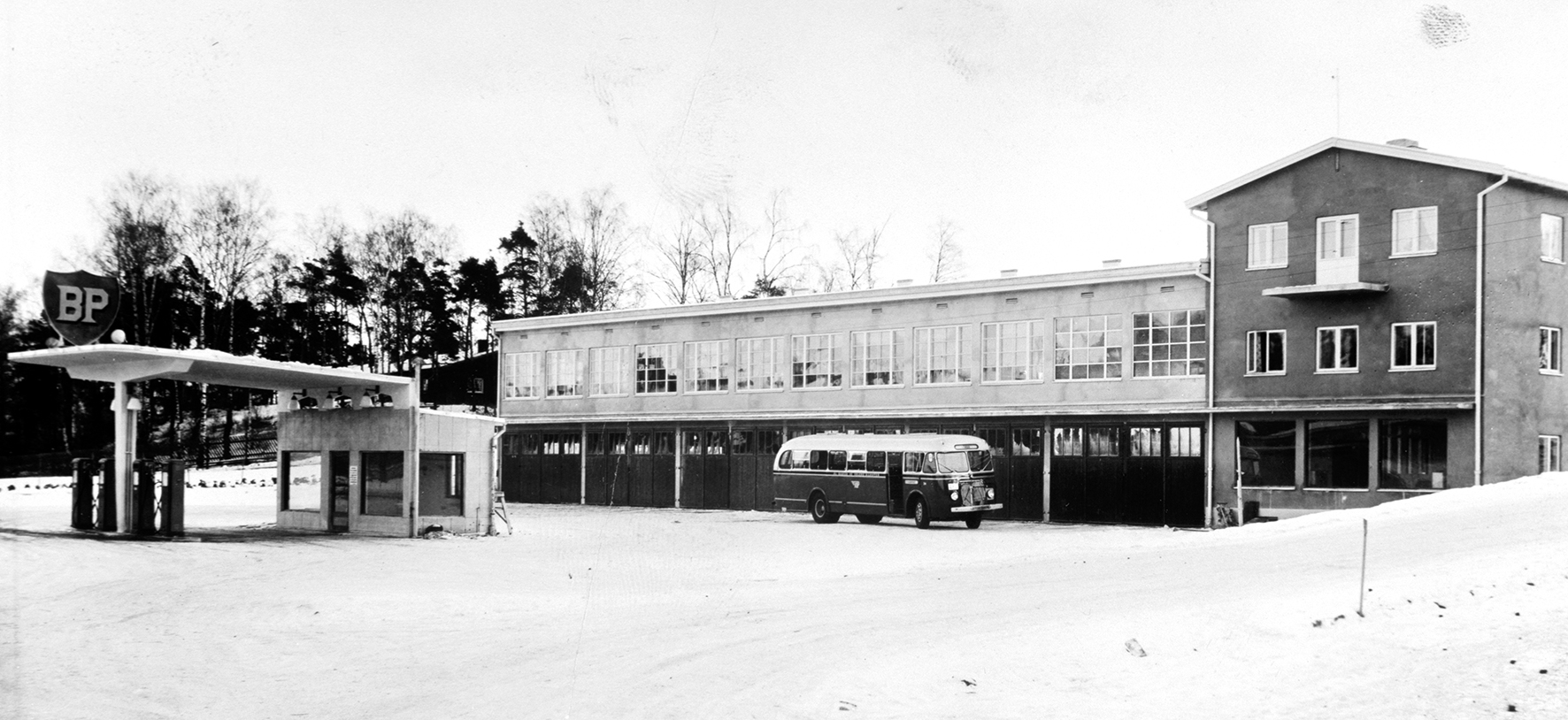 Hamar og Omlands Bilruters garasje- og serviceanlegg i Vangsvegen 91